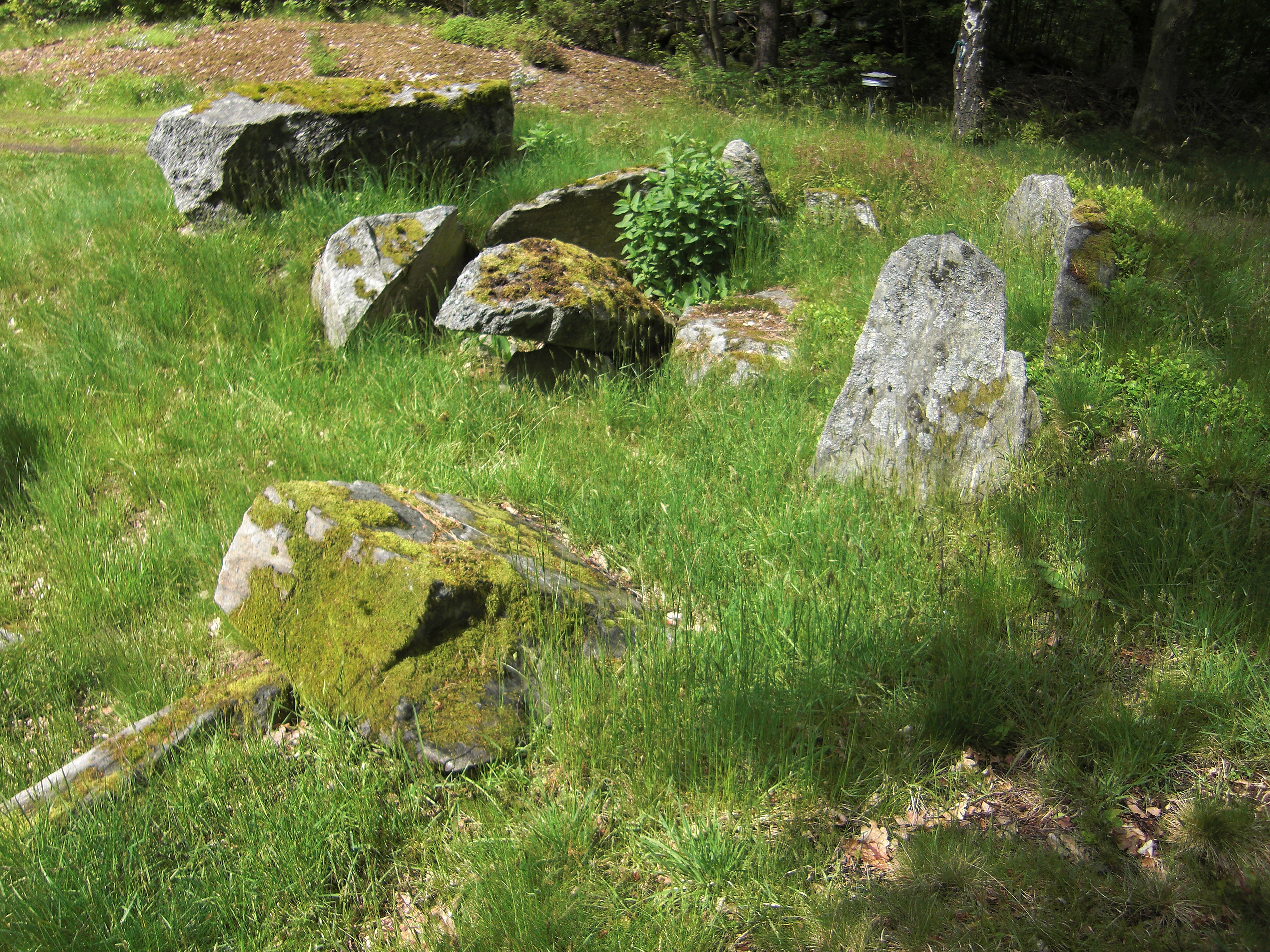 Gånggriften Kung Östens grav (RAÄ-nr Björlanda 190:1) i Björlanda socken, Västra Hisings härad, Göteborgs kommun, Bohuslän, Västra Götalands län, Sverige.